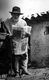 Leyendo El periódico El Campesino